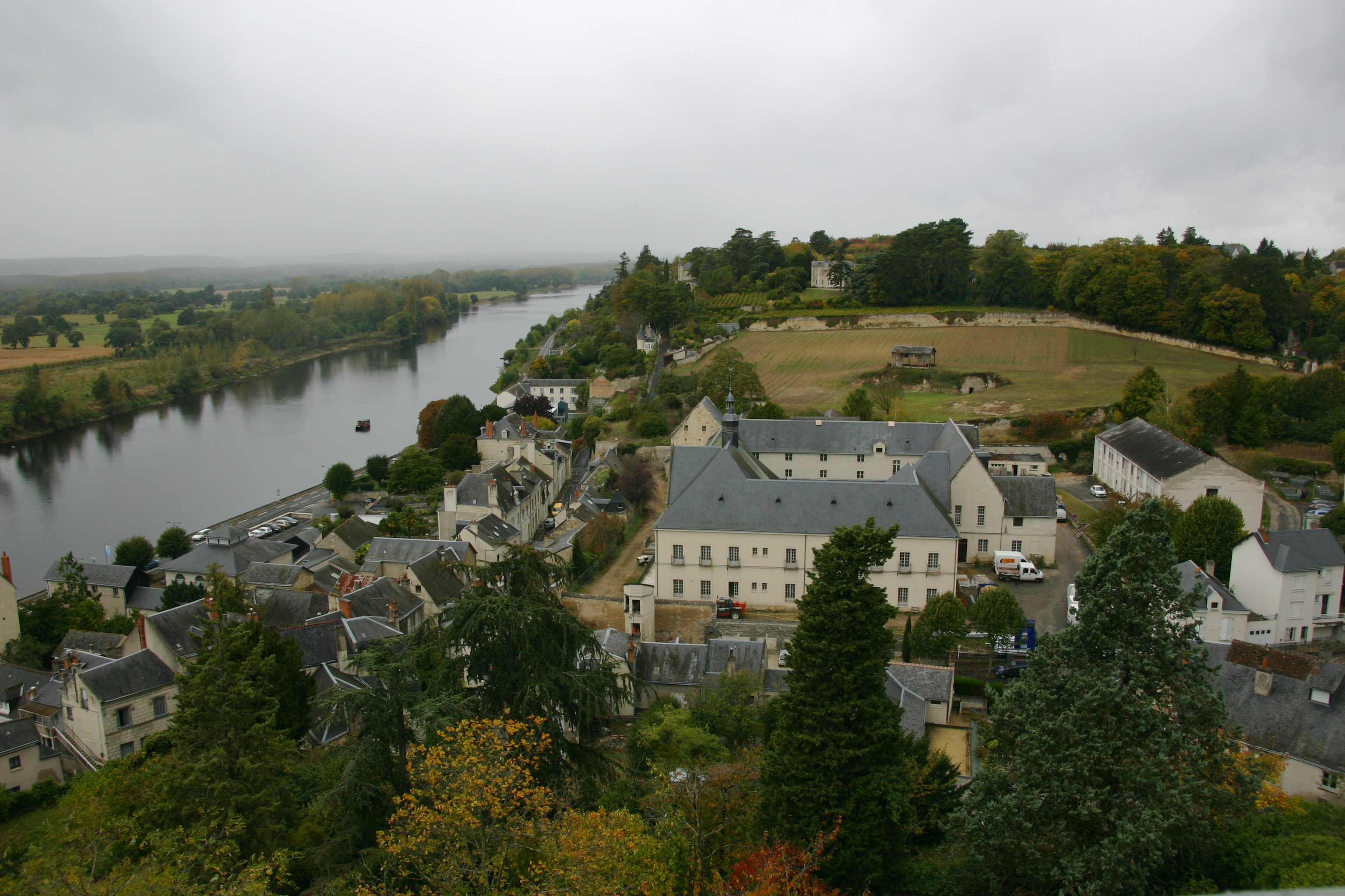 Chinon